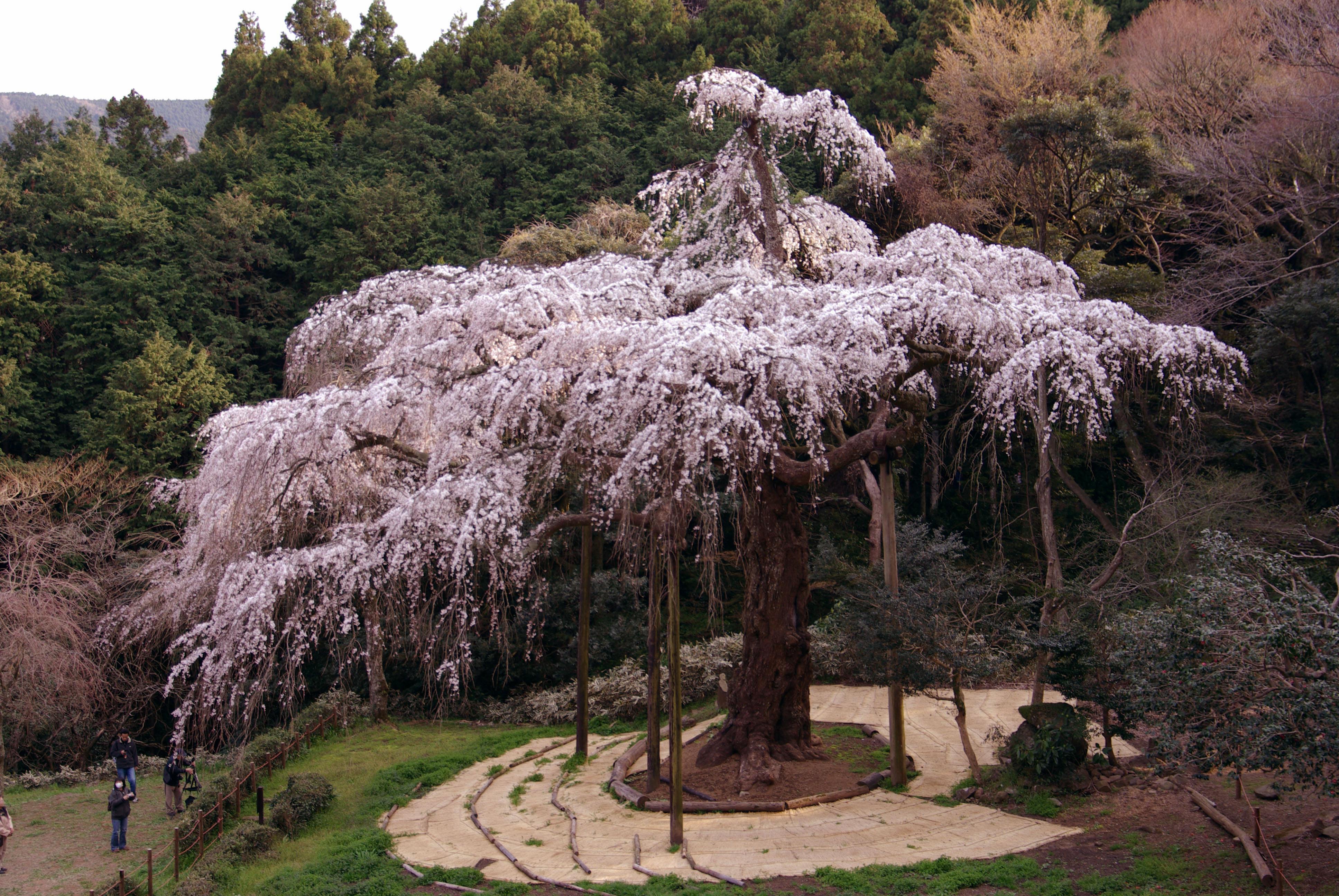 Chokozan no Shidarezakura, Odawara city (神奈川県小田原市にある長興山のしだれ桜)